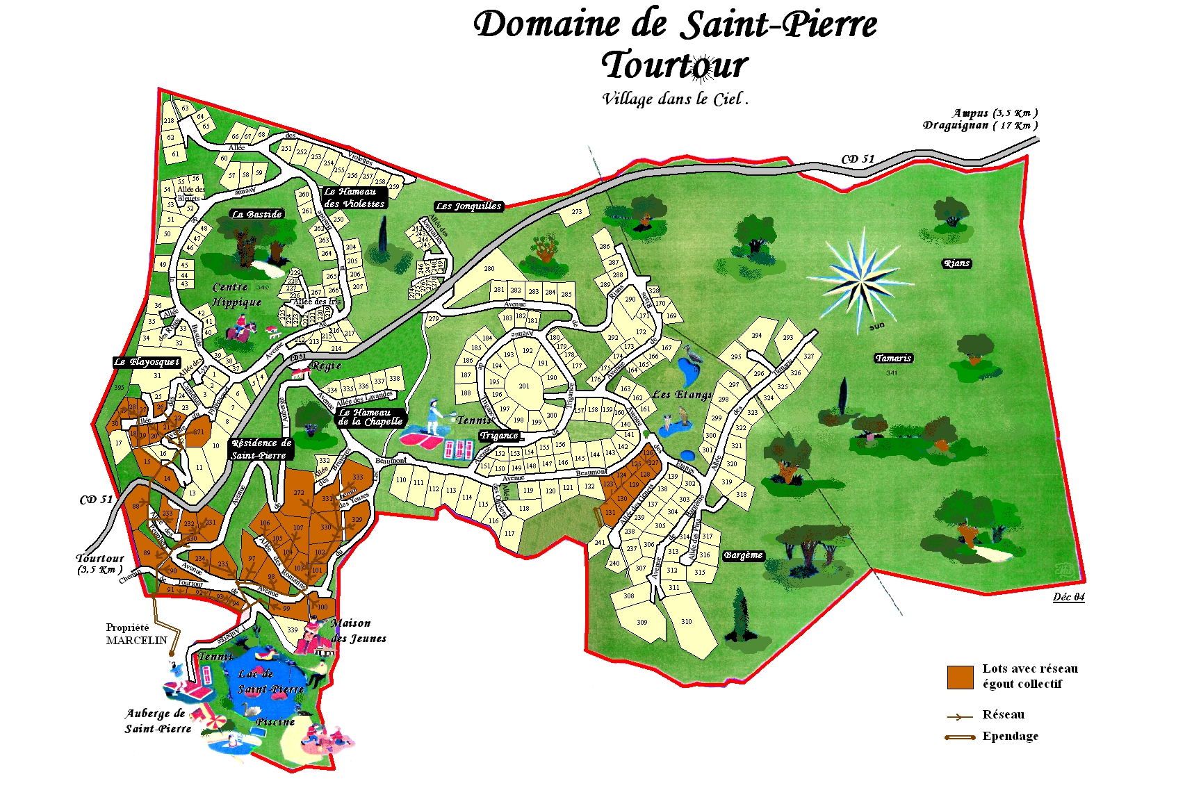 Var, Ampus, Domaine Saint Pierre, Réseau collectif de 44 lots du domaine Saint Pierre de Tourtour (source : réglement de copropriété)